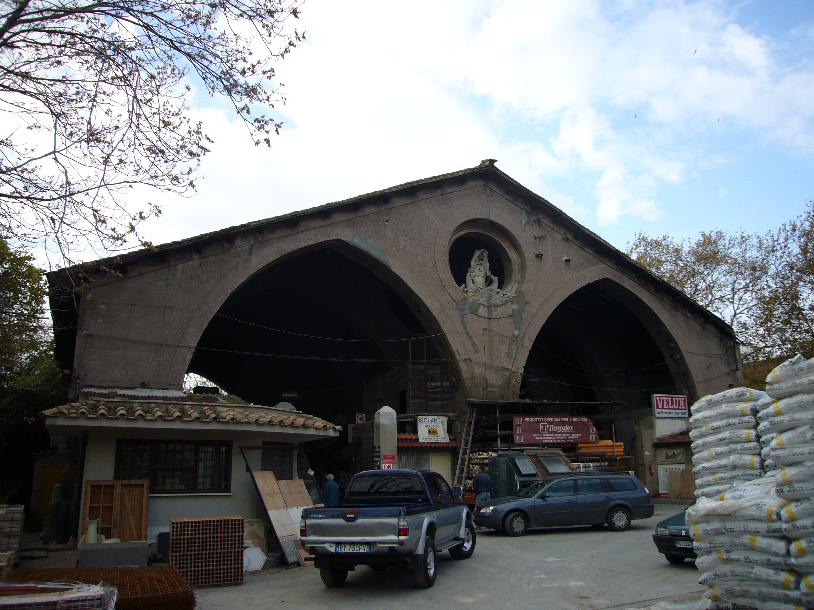 Roma, Arsenale di Ripa Grande a PortaPortese